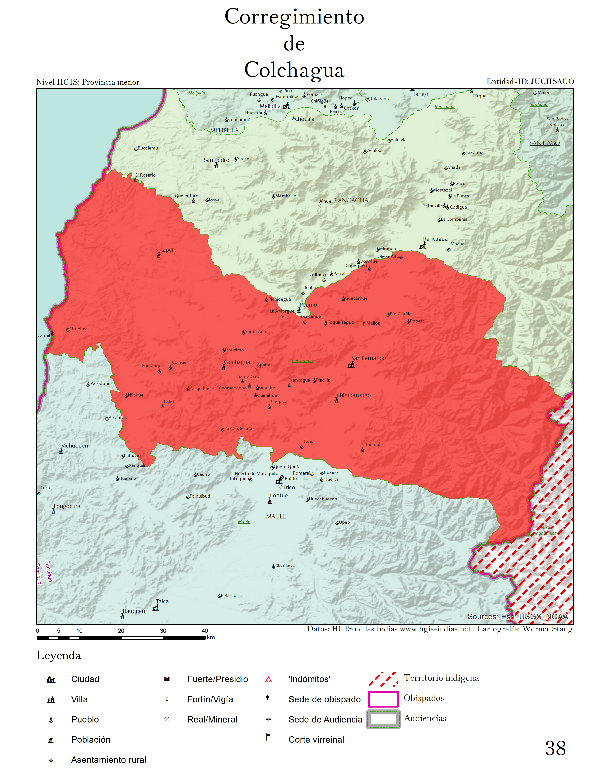 El Corregimiento de Colchagua en 1750